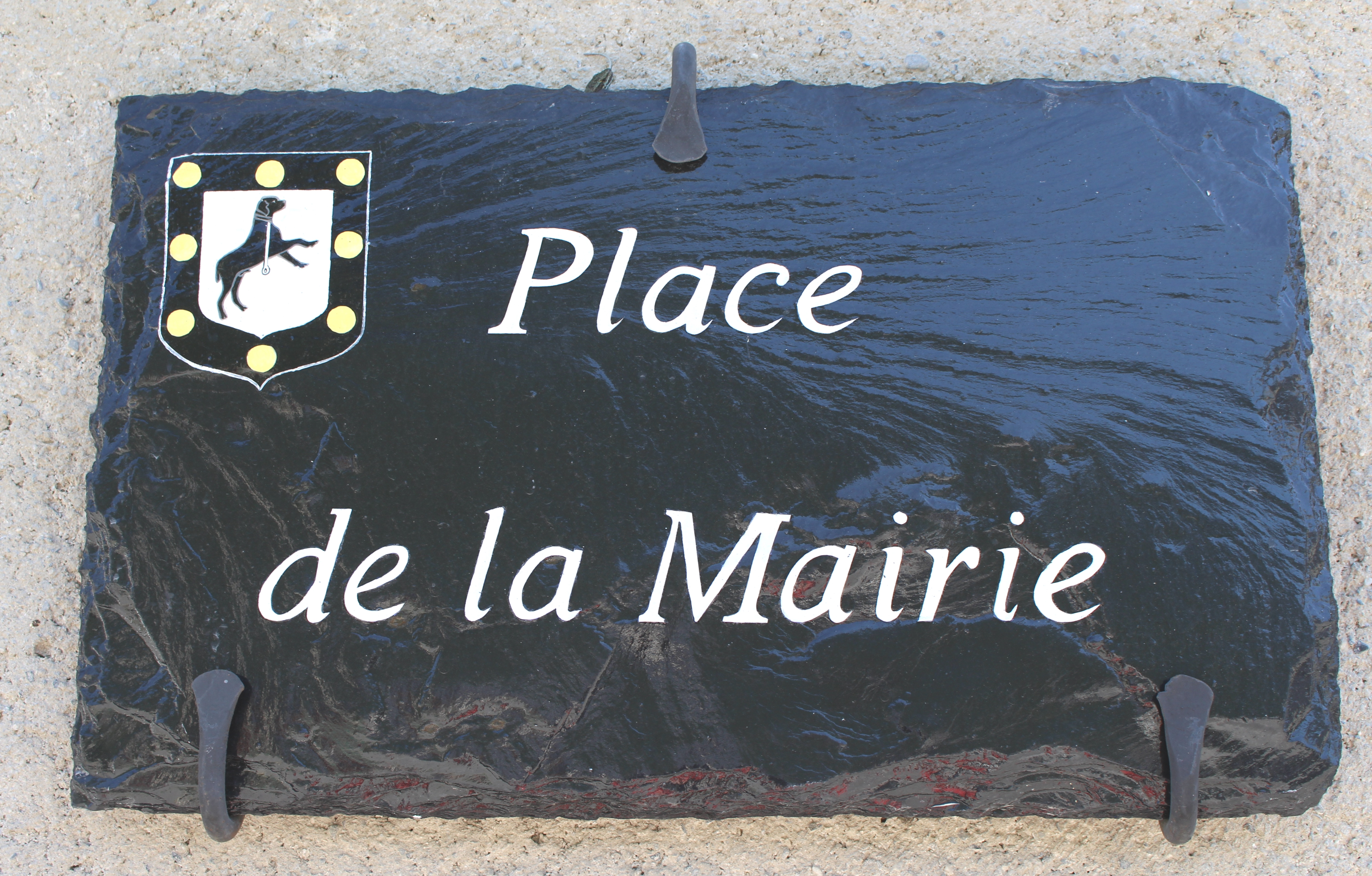 Rue du village de Guchan (Hautes-Pyrénées)